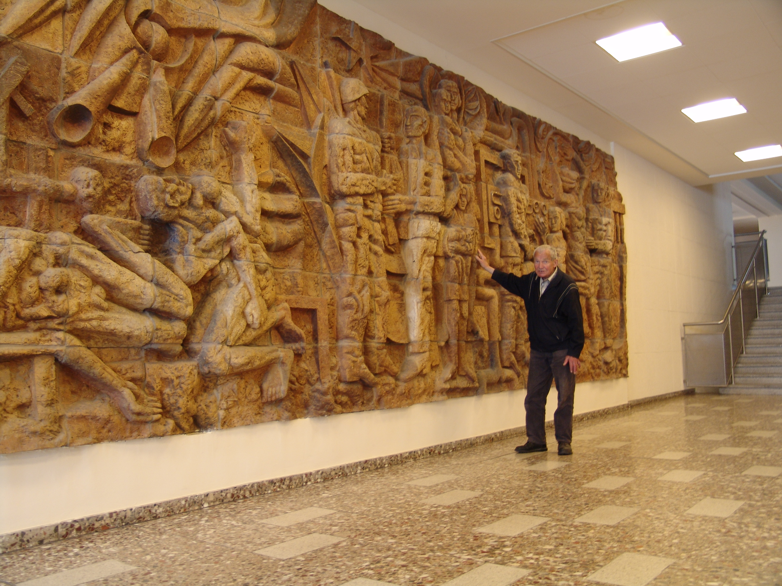 Relief im Eingangsbereich Cecilienstr.92, 12683 Berlin, ehemalige Volkspolizei Berlin